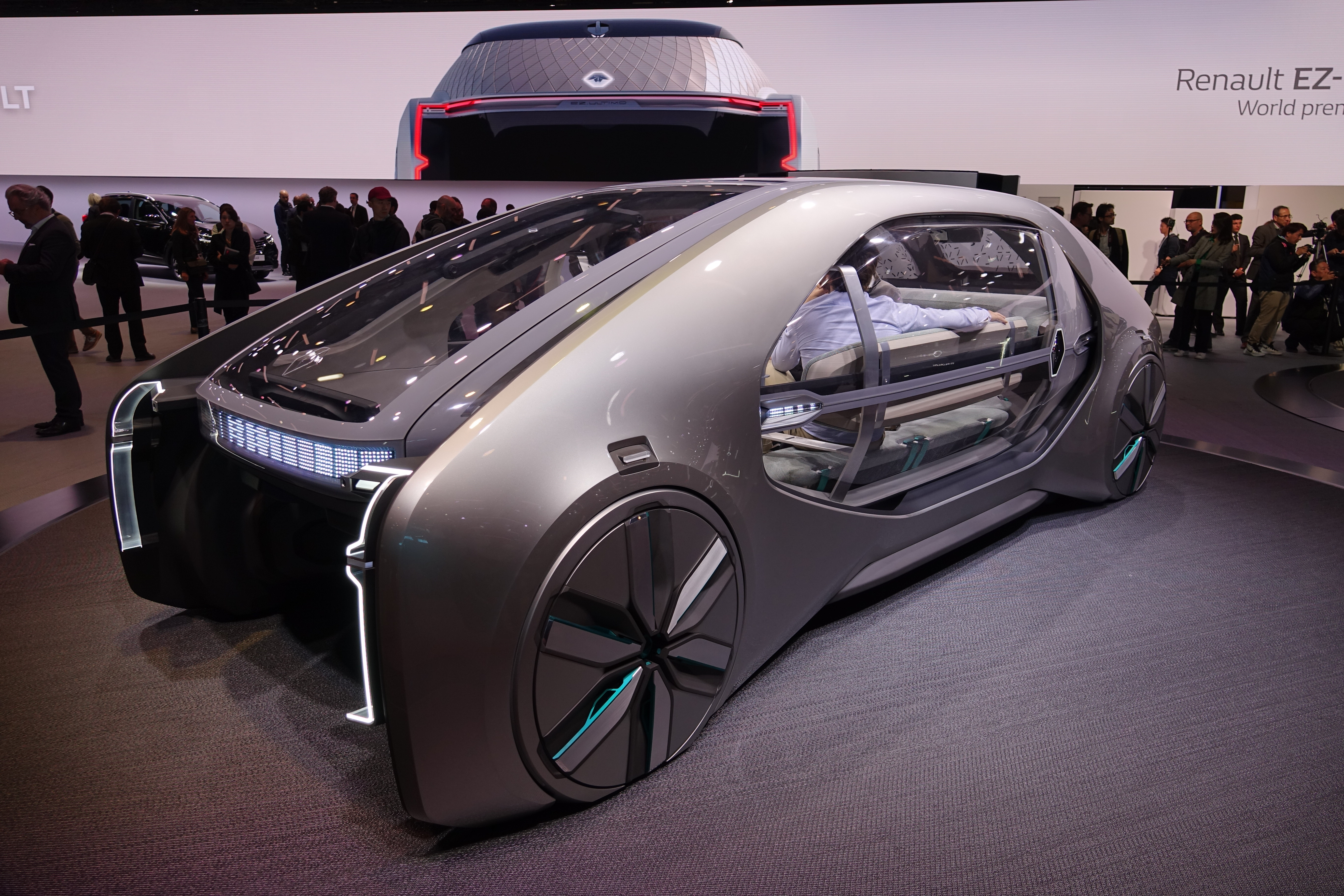 Renault EZ-GO au Mondial 2018